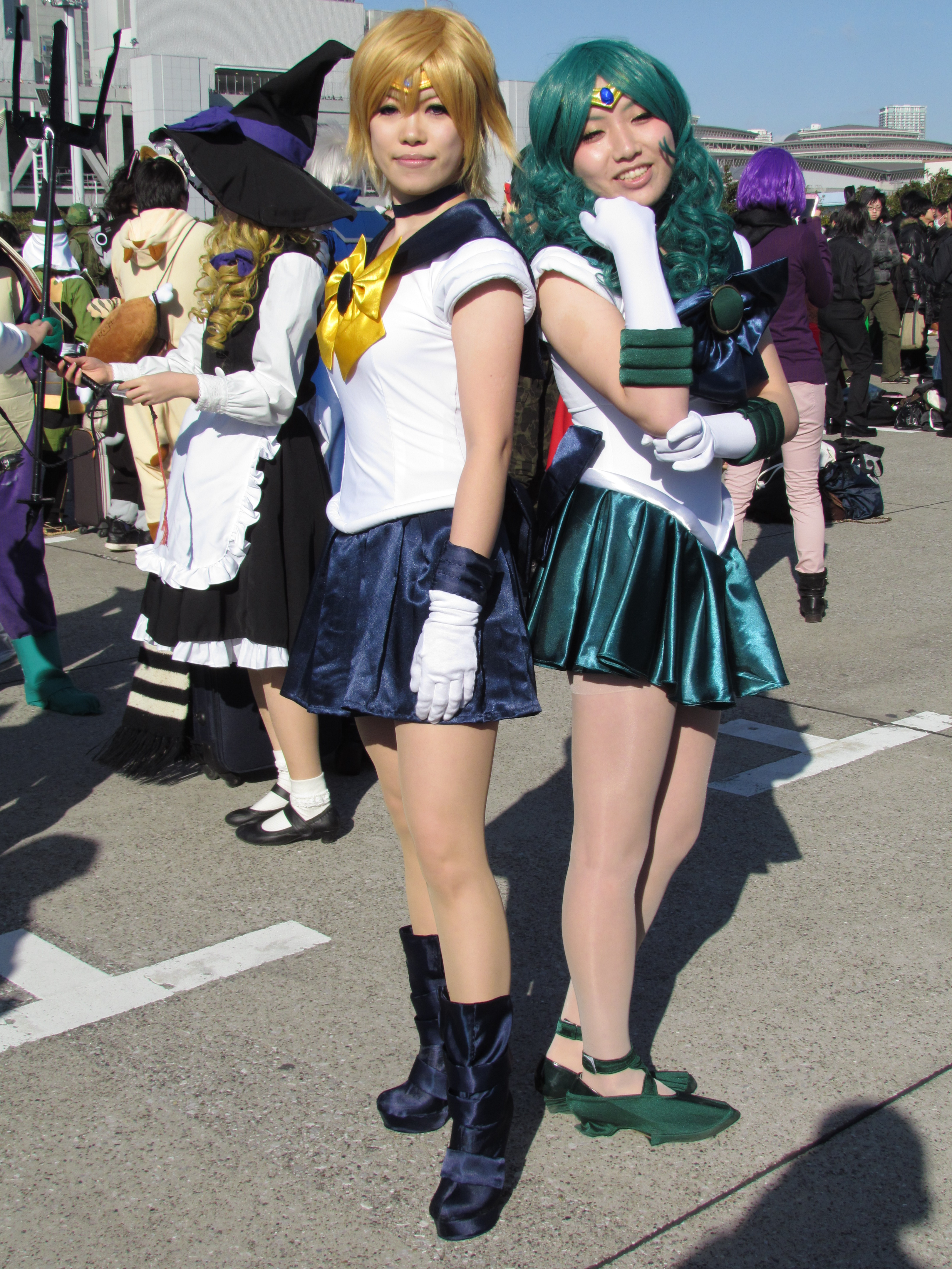 Cosplay en Comiket 83